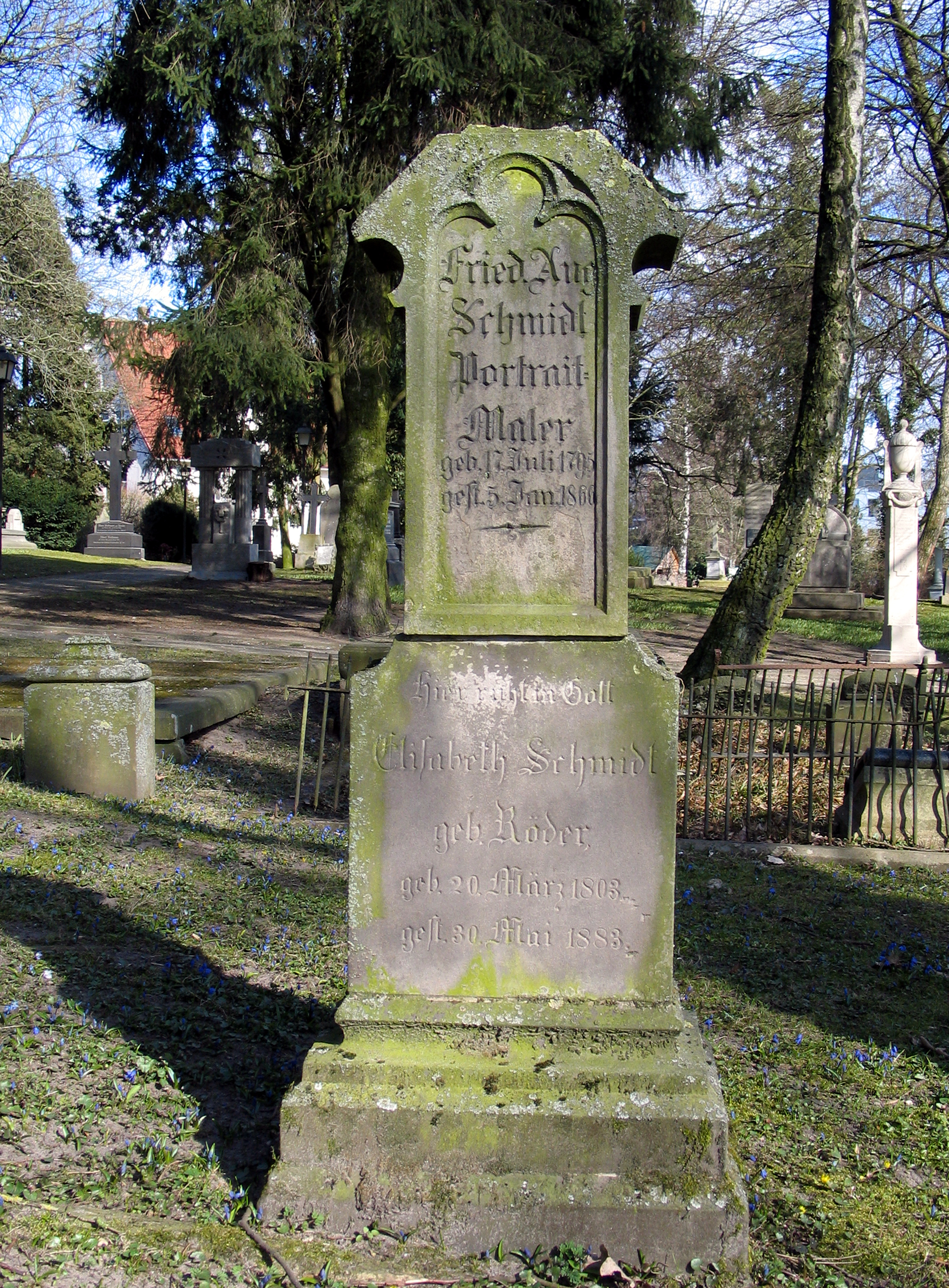 Foto vom Helentorfriedhof, östlicher Teil ...